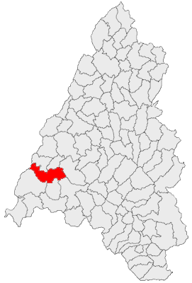 Categorie:Hărţi ale judeţului Bihor